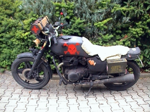 Ratbike